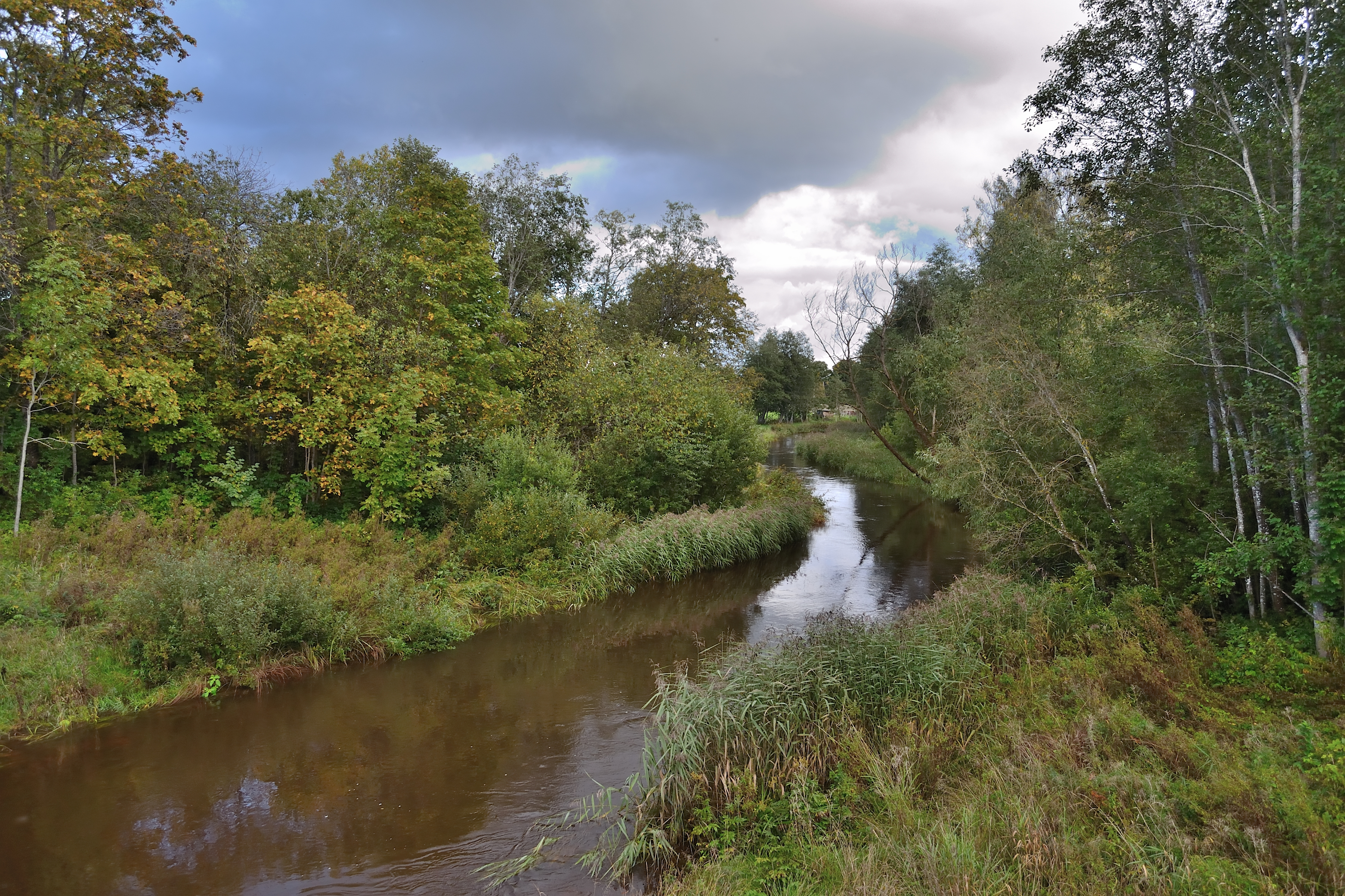 Vasalemma jõgi Keila-Haapsalu mnt lähedal